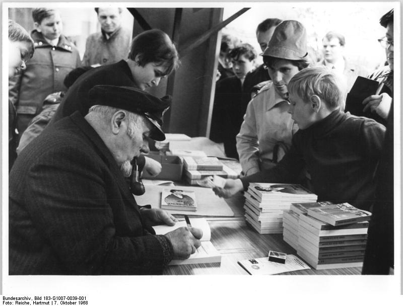 Zentralbild Reiche 7.10.68 Berlin: Volksfest zum 19. Jahrestag der DDR Mit Volksfesten in Städten und Gemeinden der DDR begingen die Einwohner der DDR den Tag der Republik. Auf dem Basar des Künstlerverbandes in der Karl-Marx-Allee signierte der Schriftsteller Ludwig Turek seine beiden Bücher "Ich war kein Duckmäuser" und "Klar zur Wende".